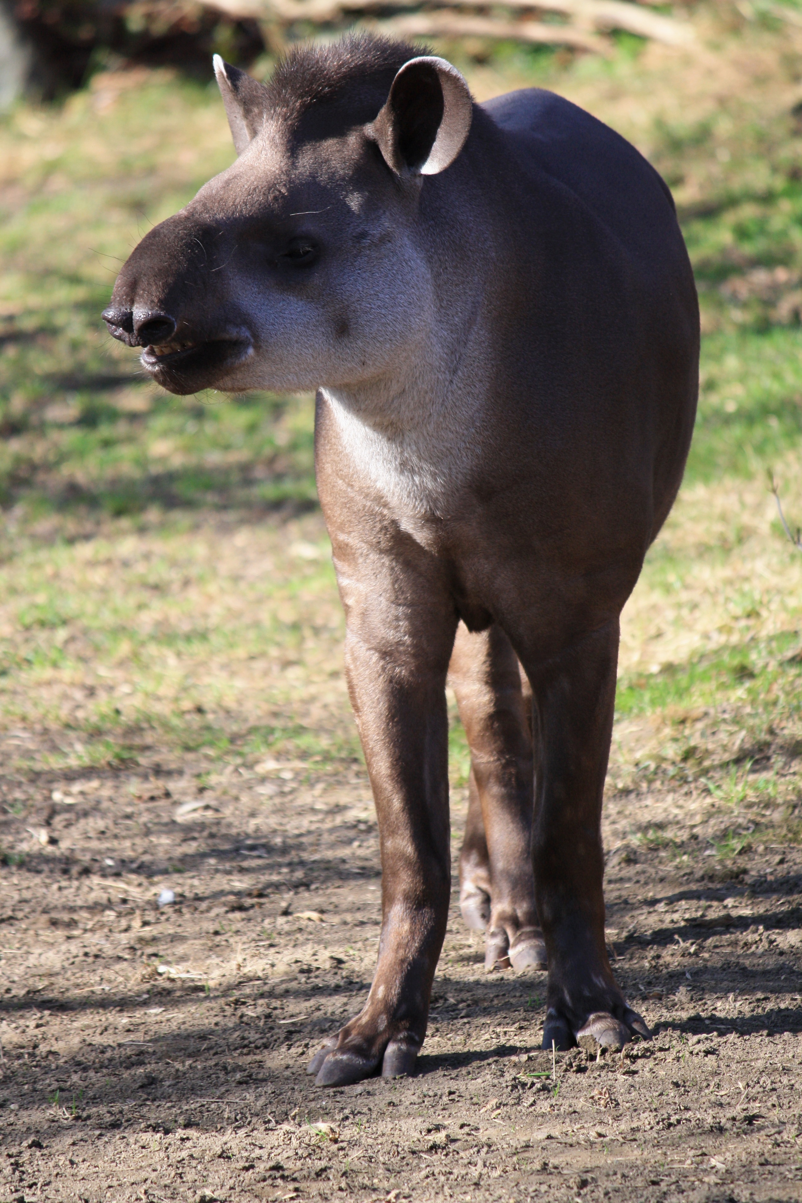 Tapír jihoamerický v pražské Zoo